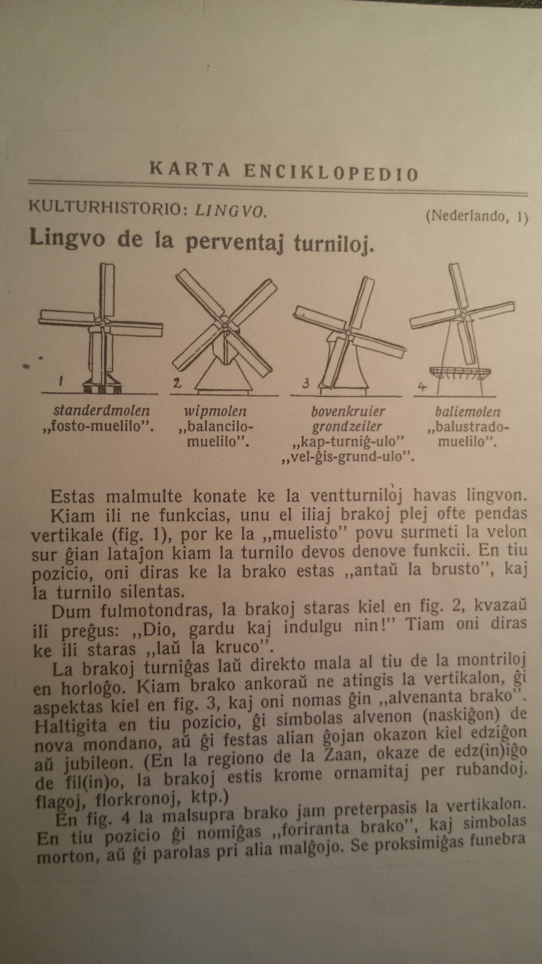 Lingvo de la perventaj turniloj